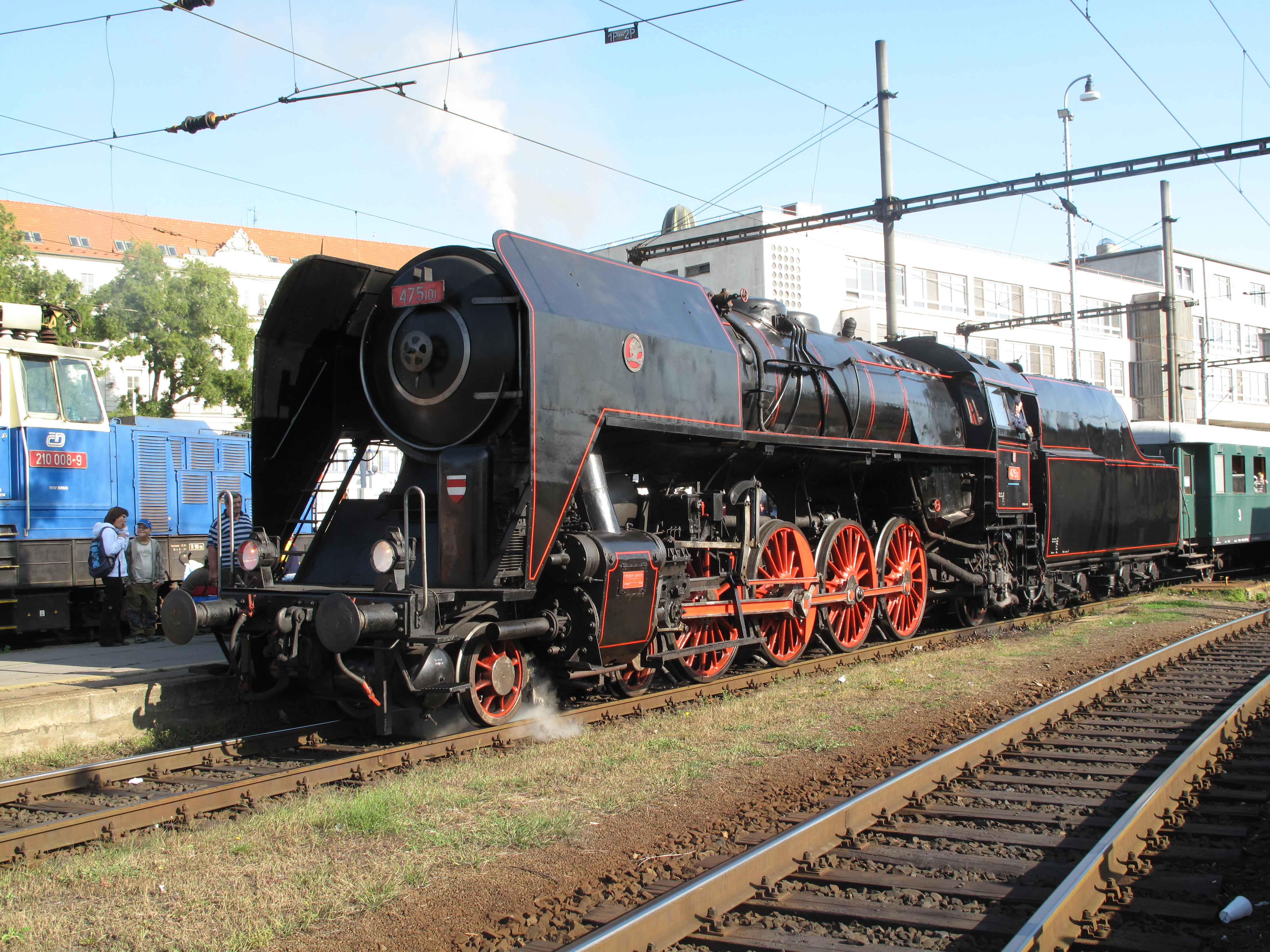 Parní lokomotiva v Brně